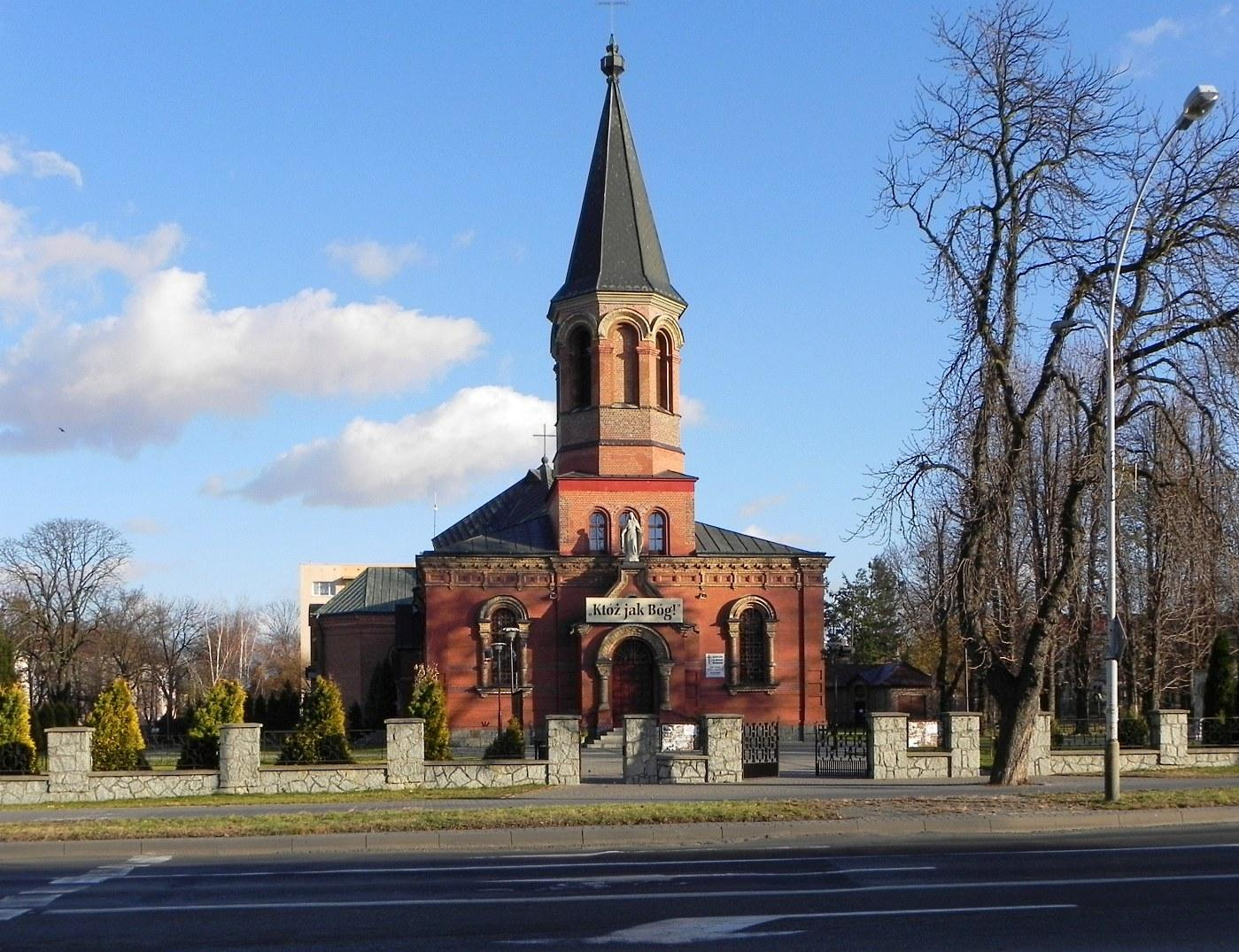 Aktualny stan dawnej cerkwi św. Mikołaja obecnie kościół św. Michała Archanioła po wielu przebudowach.